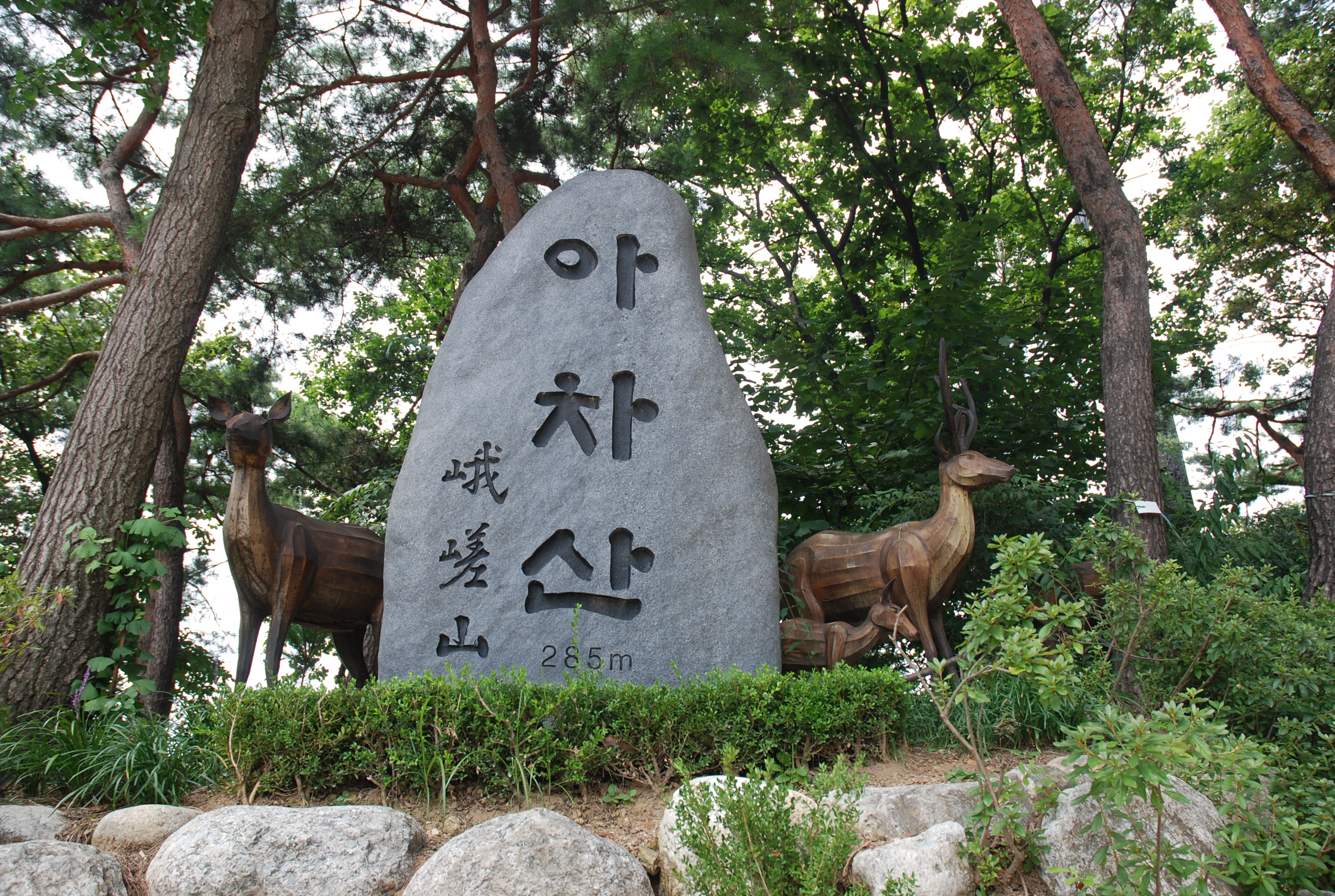 아차산 이정표